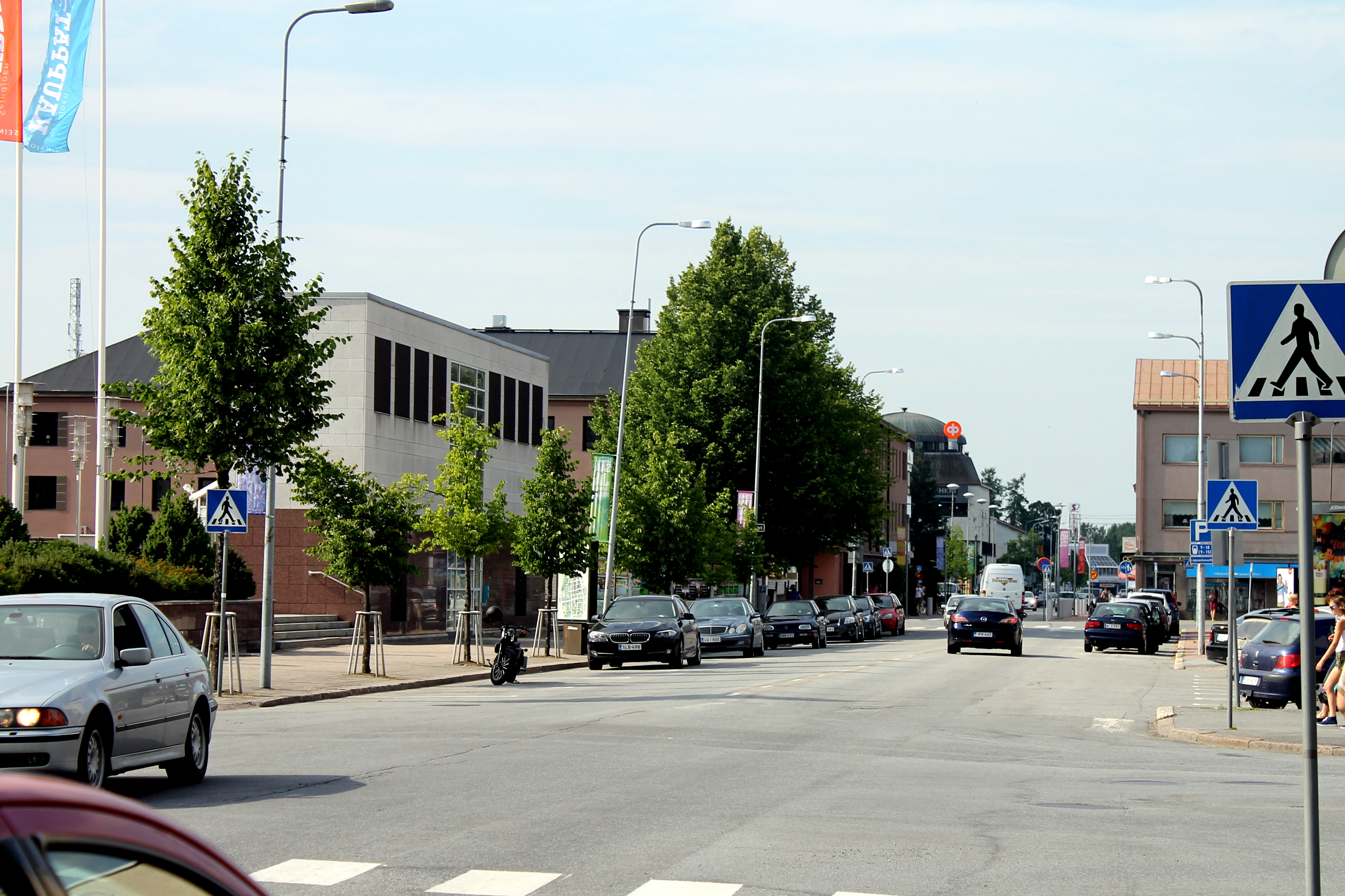 Katunäkymä Koulukadulta Torikeskuksen kohdalla